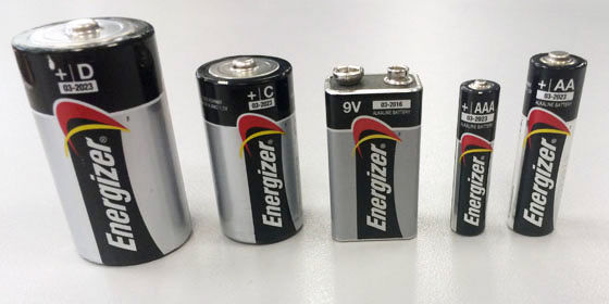 Линейка батареек Energizer